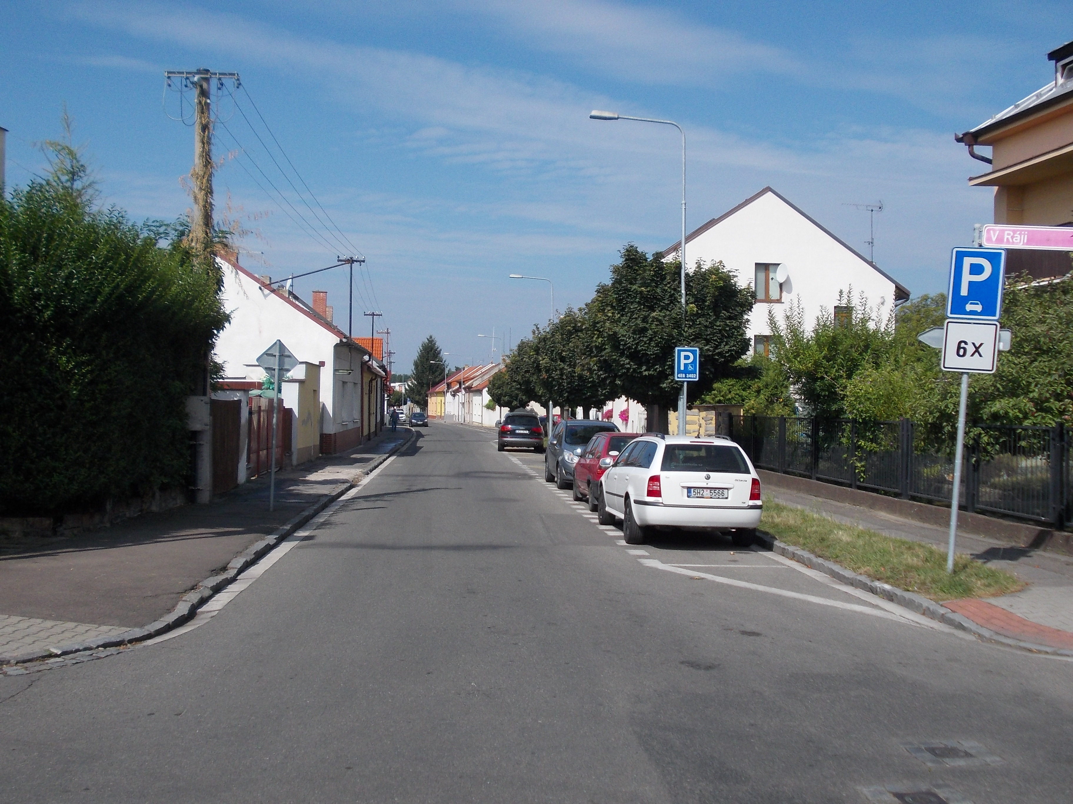 Nové Jesenčany - ulice Na Záboří